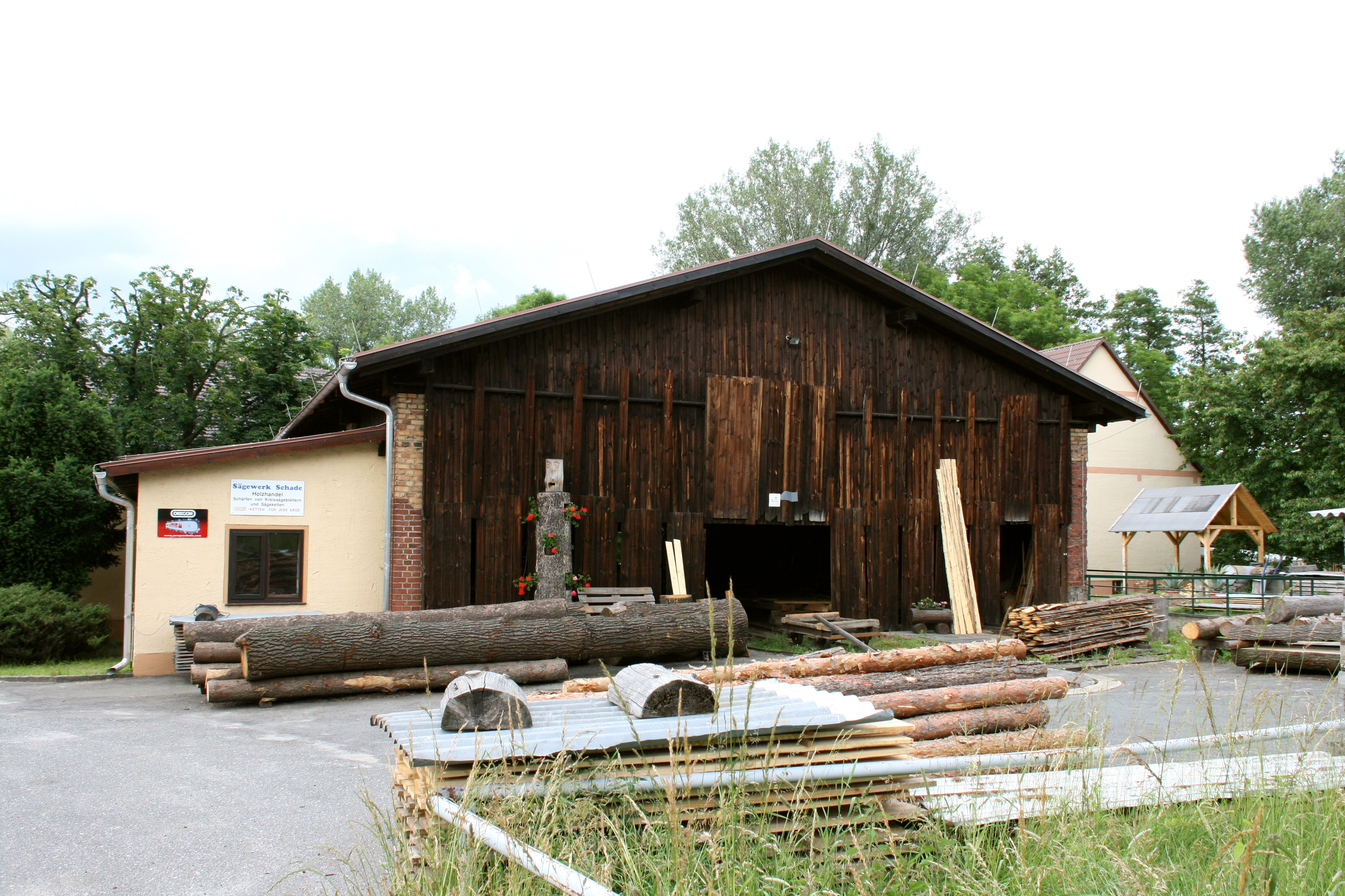 Sägewerk Wasserkretscham, Mühle am Löbauer Wasser in Wasserkretscham, Vierkirchen